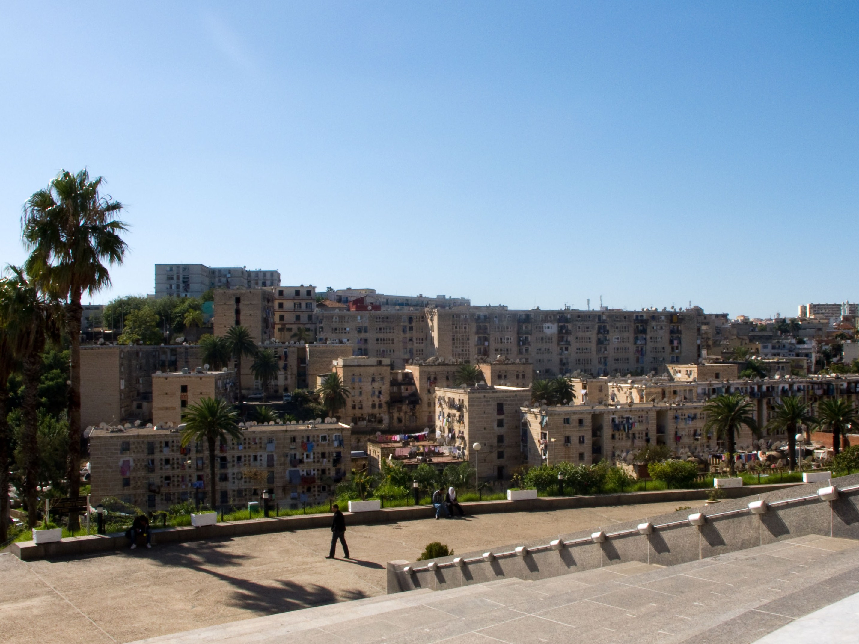 Diar El Mahçoul, Alger, Algérie